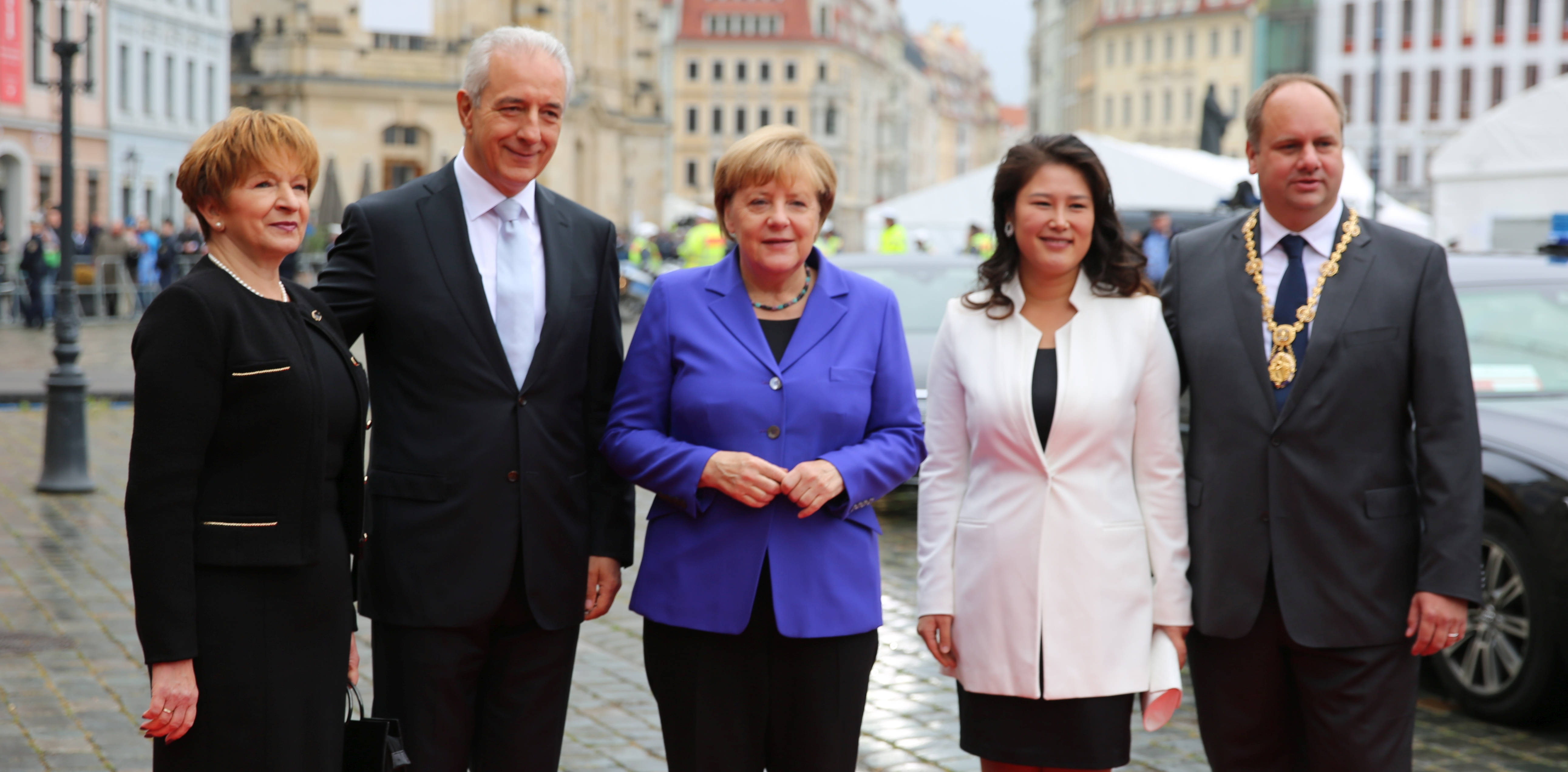 Stanislaw Tillich mit Ehefrau, Angela Merkel und Dirk Hilbert mit Ehefrau beim Tag der Deutschen Einheit 2016 in Dresden